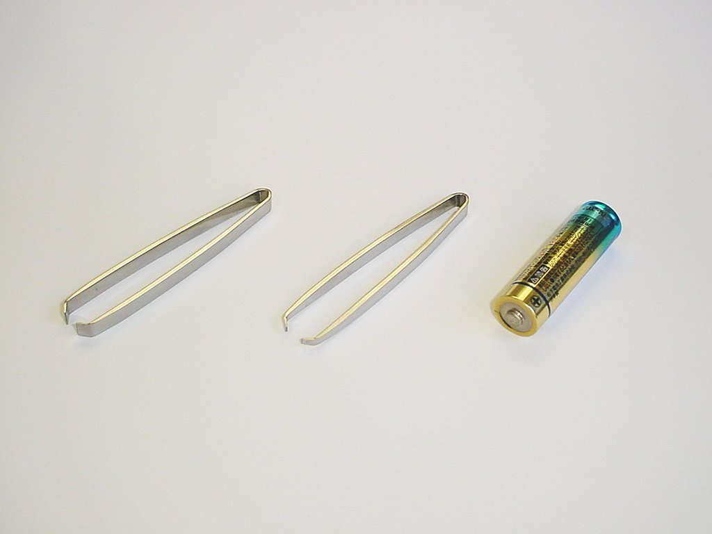 Hair tweezer